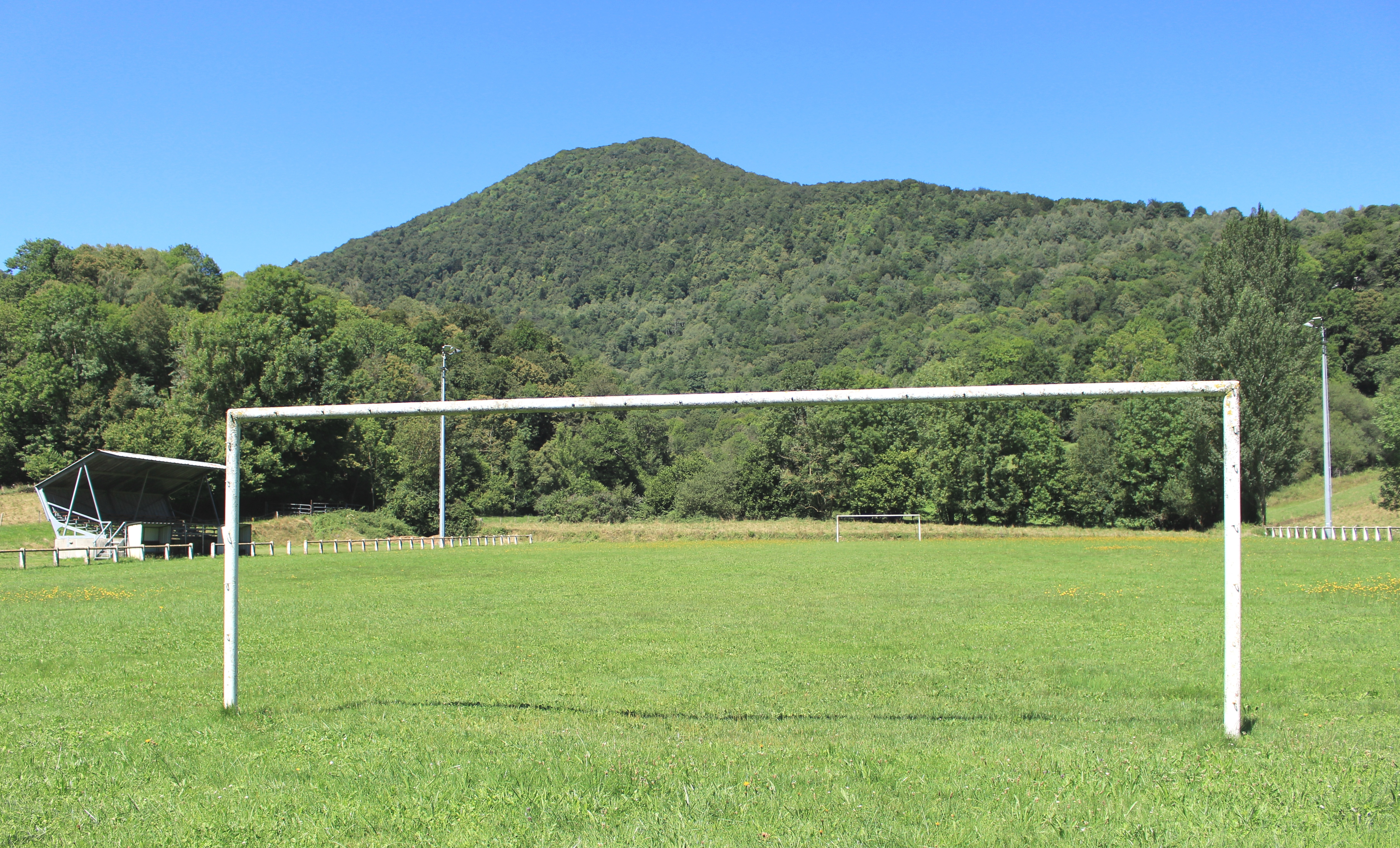 Stade de football de Hèches (Hautes-Pyrénées)